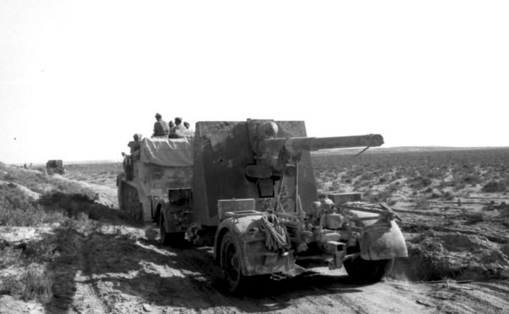 Die Kämpfe um die El-Alamein-Stellung